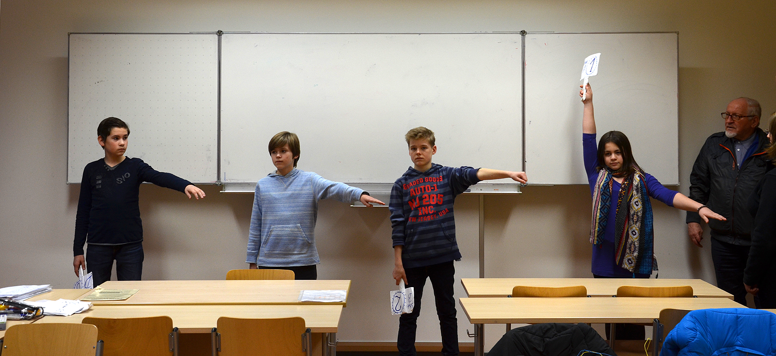 Die Zahl 1, dargestellt als miteinander verbundene, "lebendige" Flipflops und ihre jeweils erhobenen oder gesenkten Arme; Schüler der Leibnizschule in Hannover, hier in dem von dem pensionierten Dipl.-Ing. Helmut Konietzny nachmittags ehrenamtlich geleiteten Elektronikkurs für Kinder, der vom Verein ForscherGeist. Verein zur Förderung junger Forscher e.V." gefördert wird ...